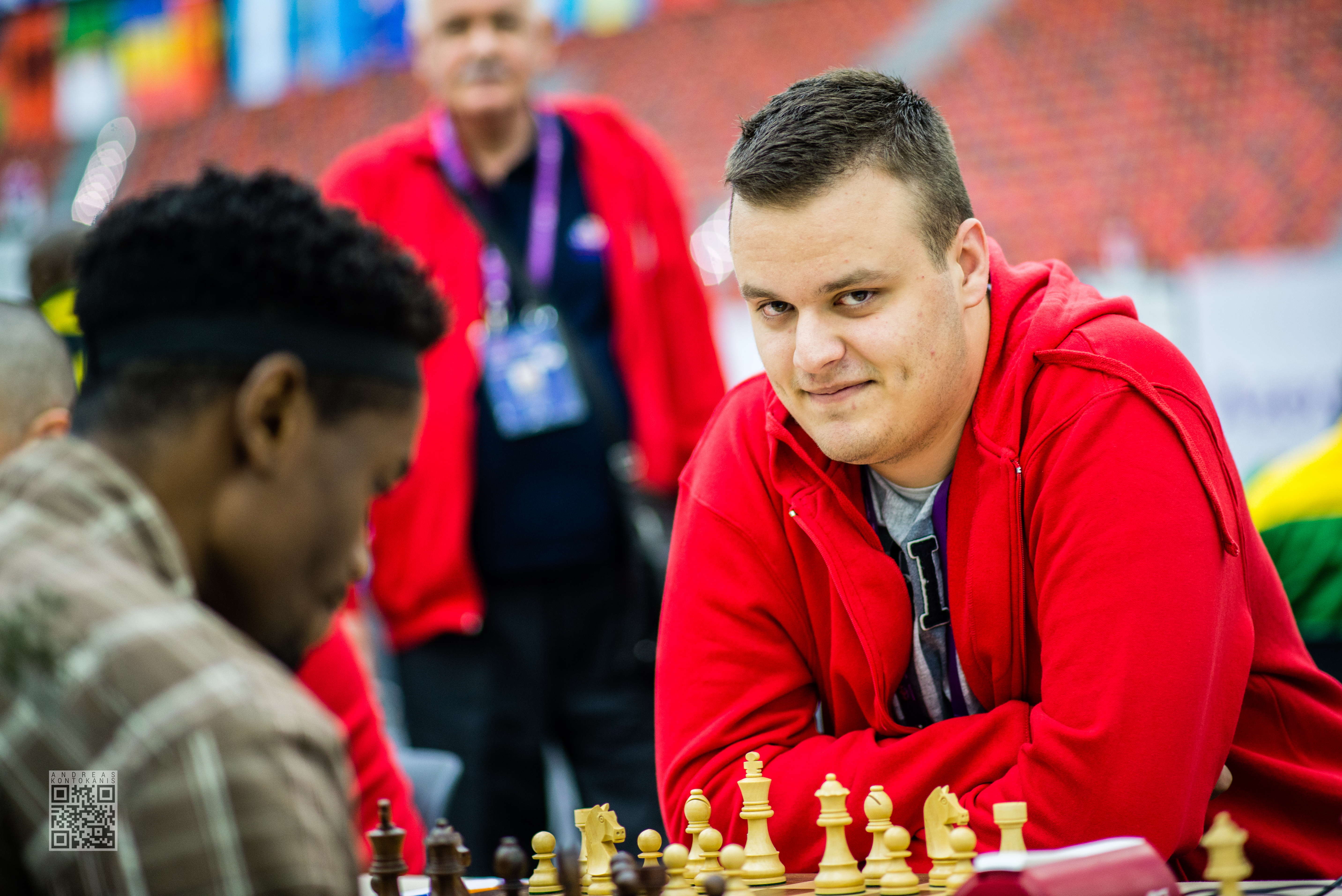 Indjic Aleksandar